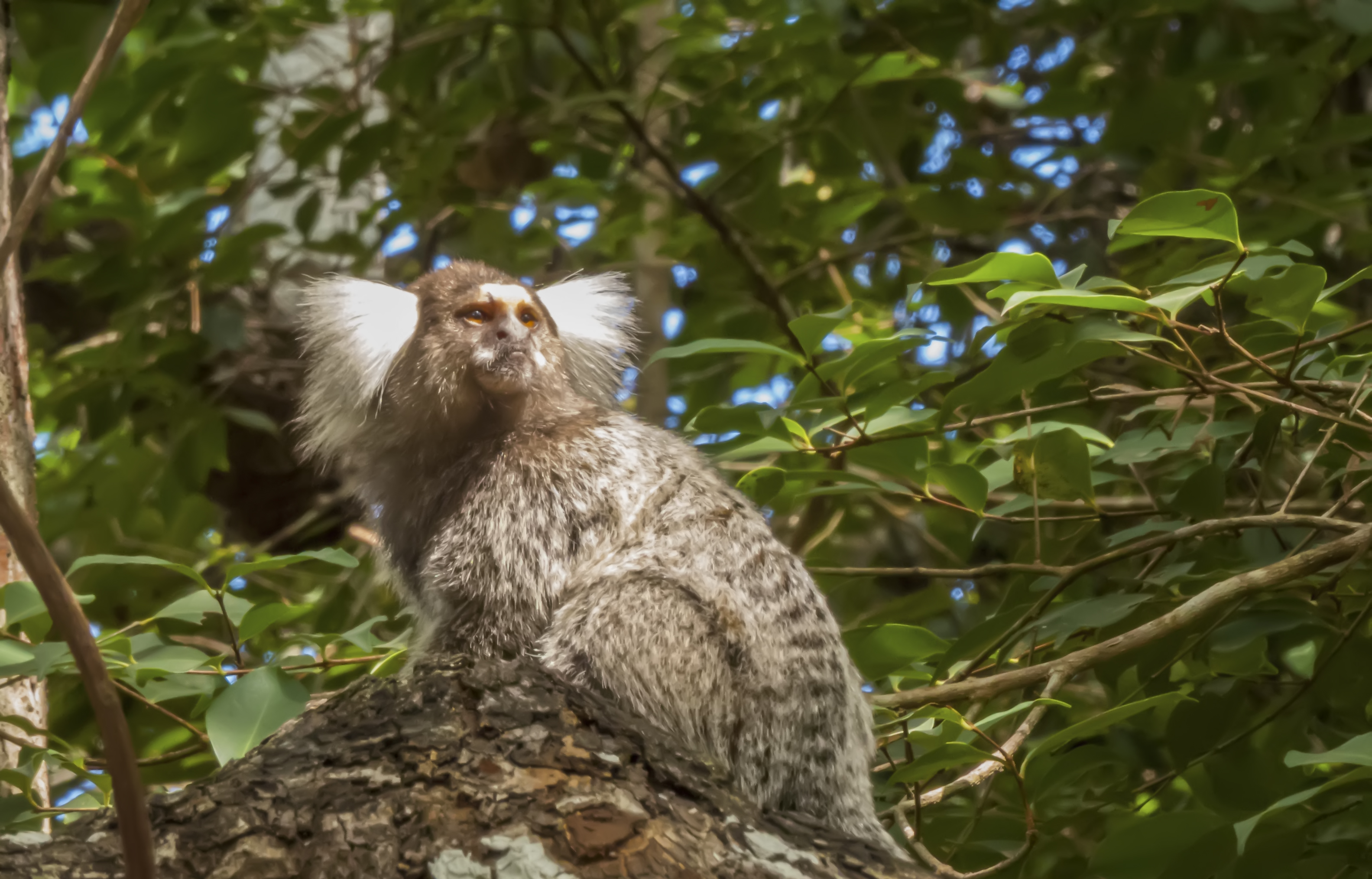 Parque Botânico de Caucaia no Ceará